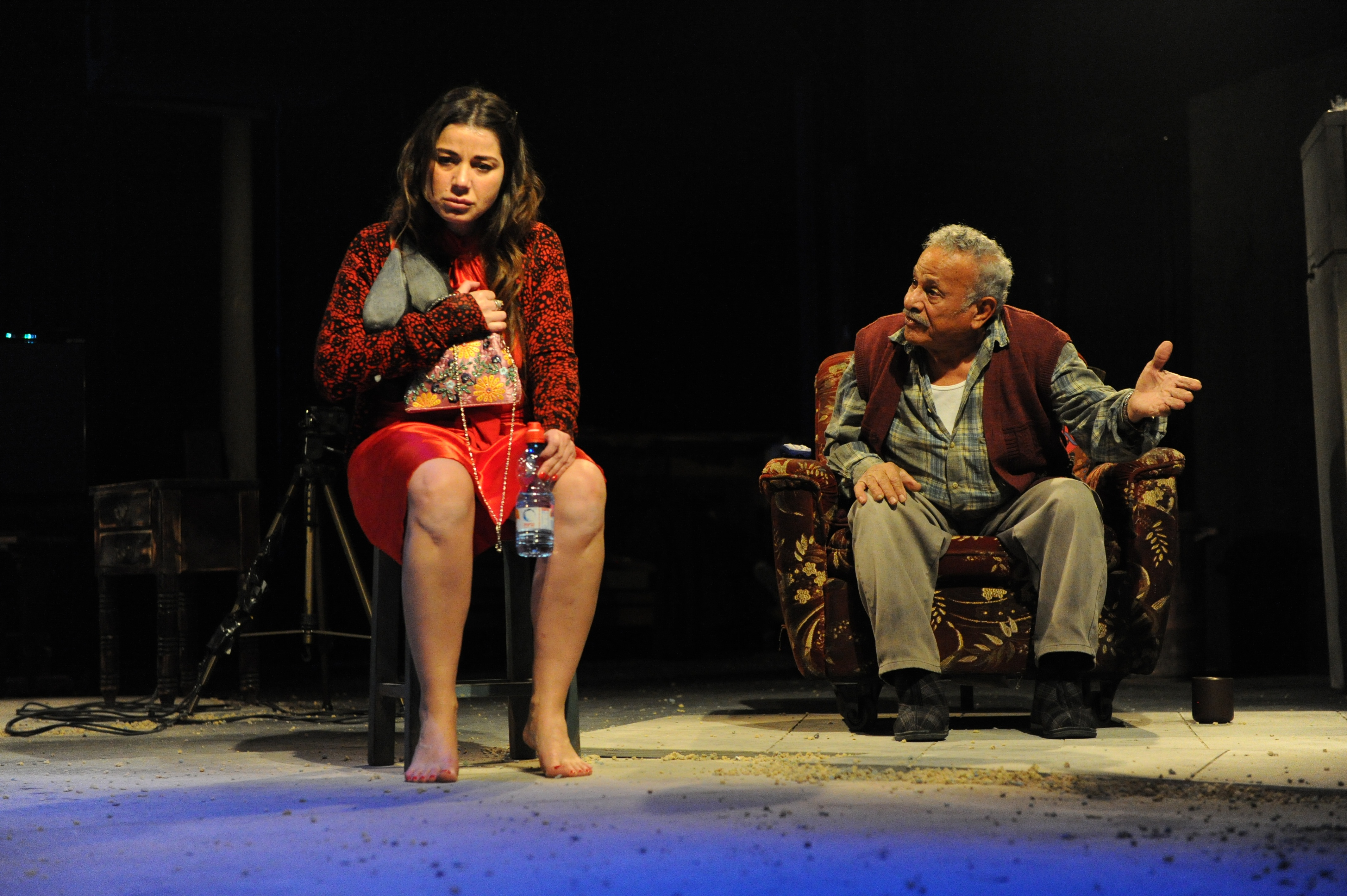 לאה קמחזי וגבי עמרני בהצגה "אברהם", מאת דוד לוין, בבימויו של עודד קוטלר, בתיאטרון אנסמבל הרצליה